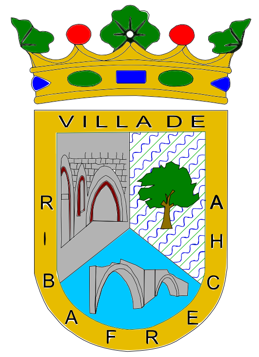 Escudo del municipio de Ribafrecha, utilizando Inkscape como herramienta, y un libro de las fiestas del pueblo como modelo.